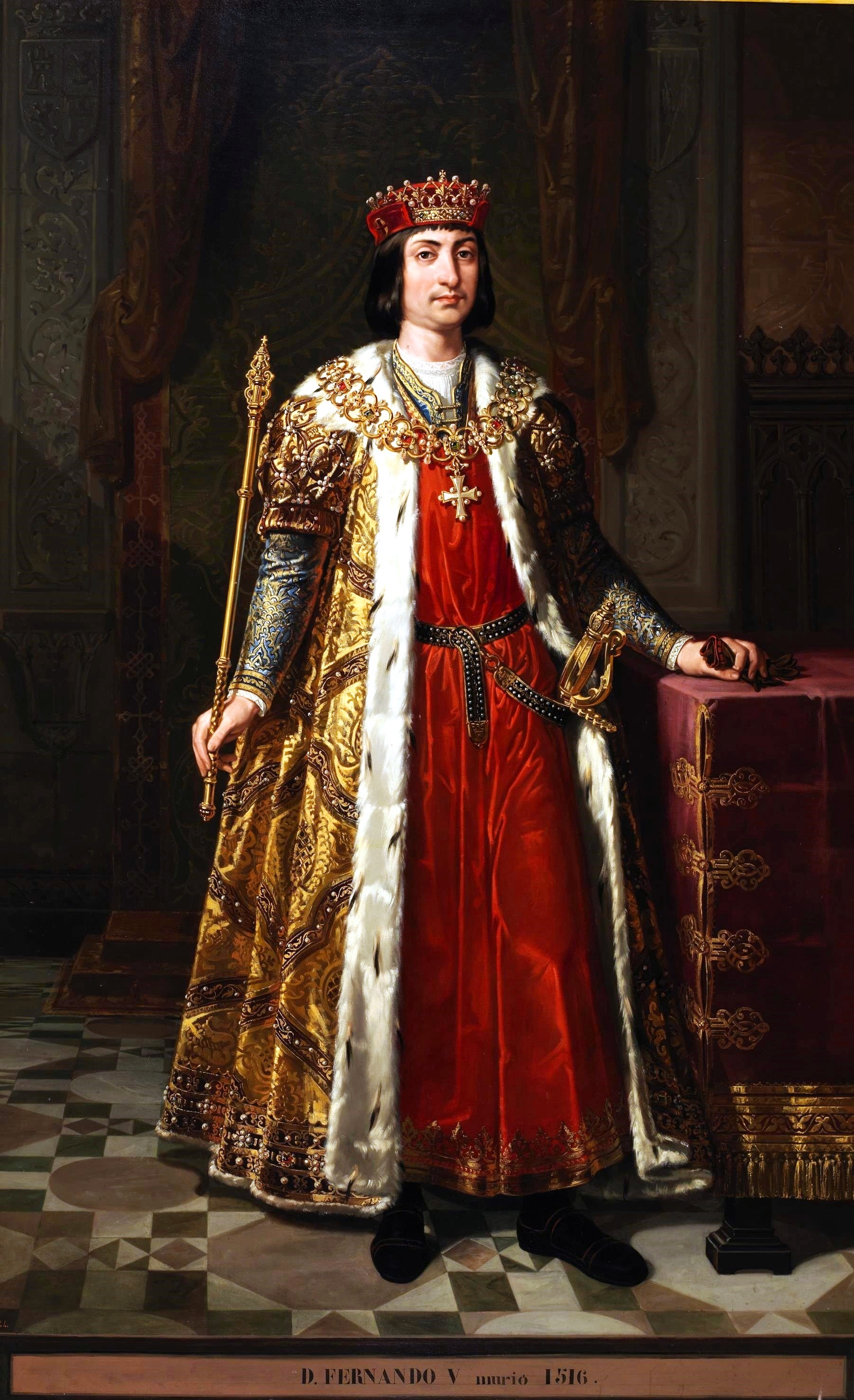 Retrato imaginario del rey Fernando II de Aragón (1452-1516), que fue hijo del rey Juan II de Aragón y de la reina Juana Enríquez y esposo de la reina Isabel I de Castilla, aunque posteriormente volvió a casarse con Germana de Foix.